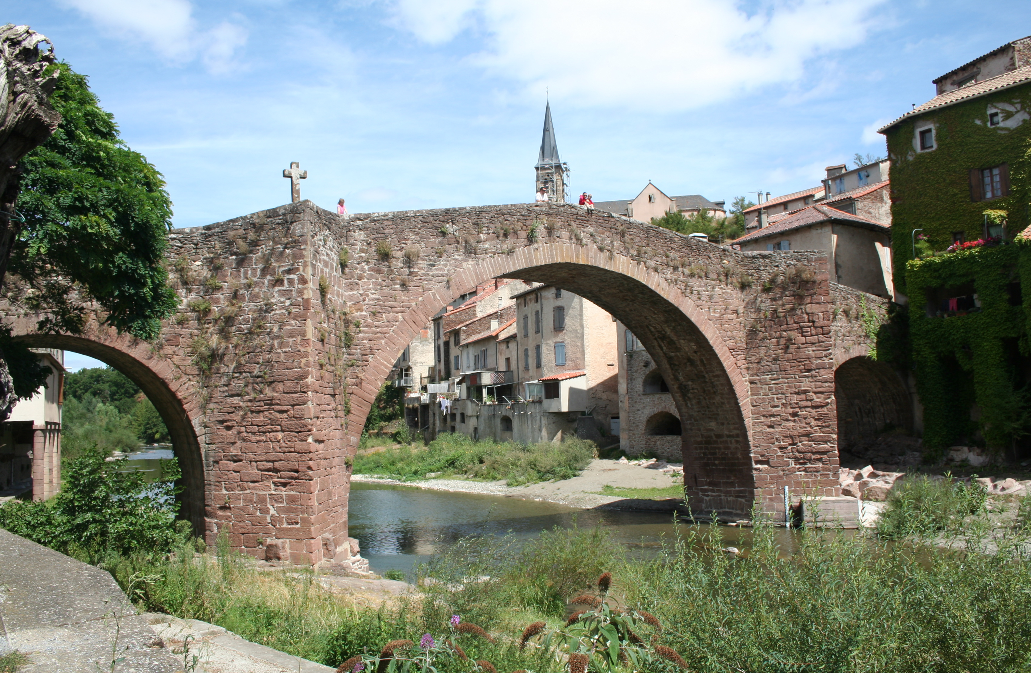 Camarès (Aveyron) - pont sur le Dourdou.